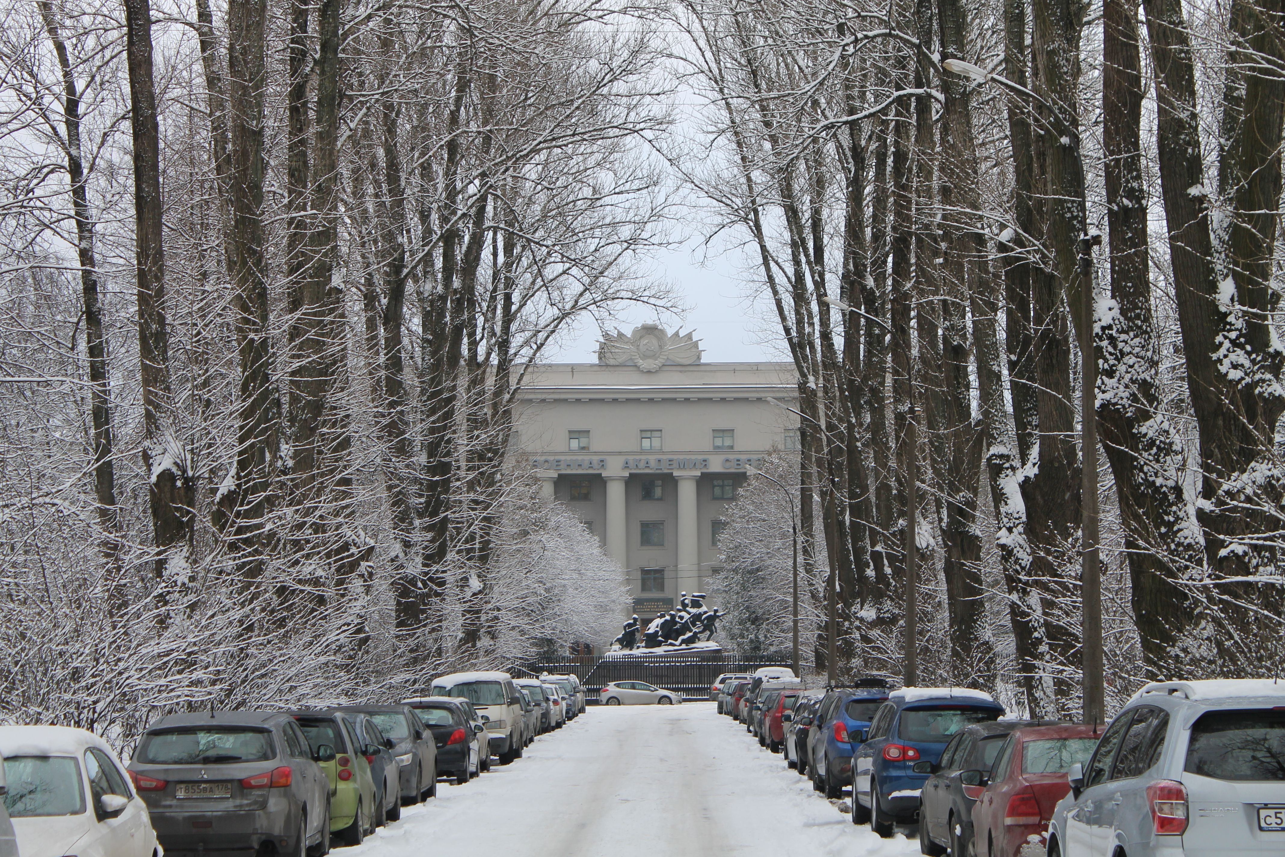 Главное здание Академии